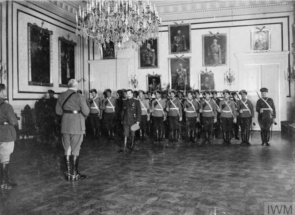 Новочеркасск. Вручение награды белому генералу Богаевскому в июле 1919 года